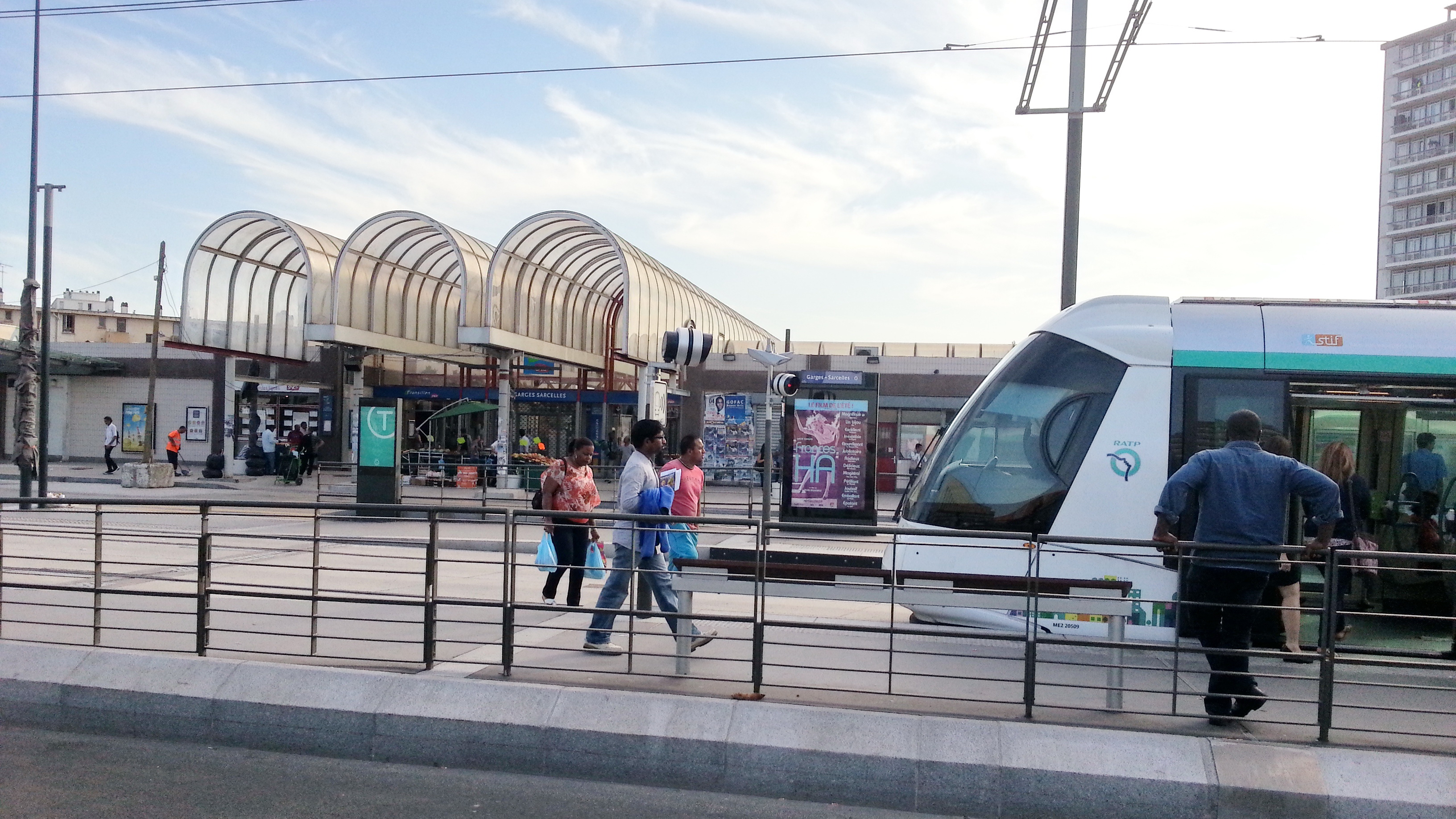 Intermodalité en gare de Garges-Sarcelles (T5 / RER D)